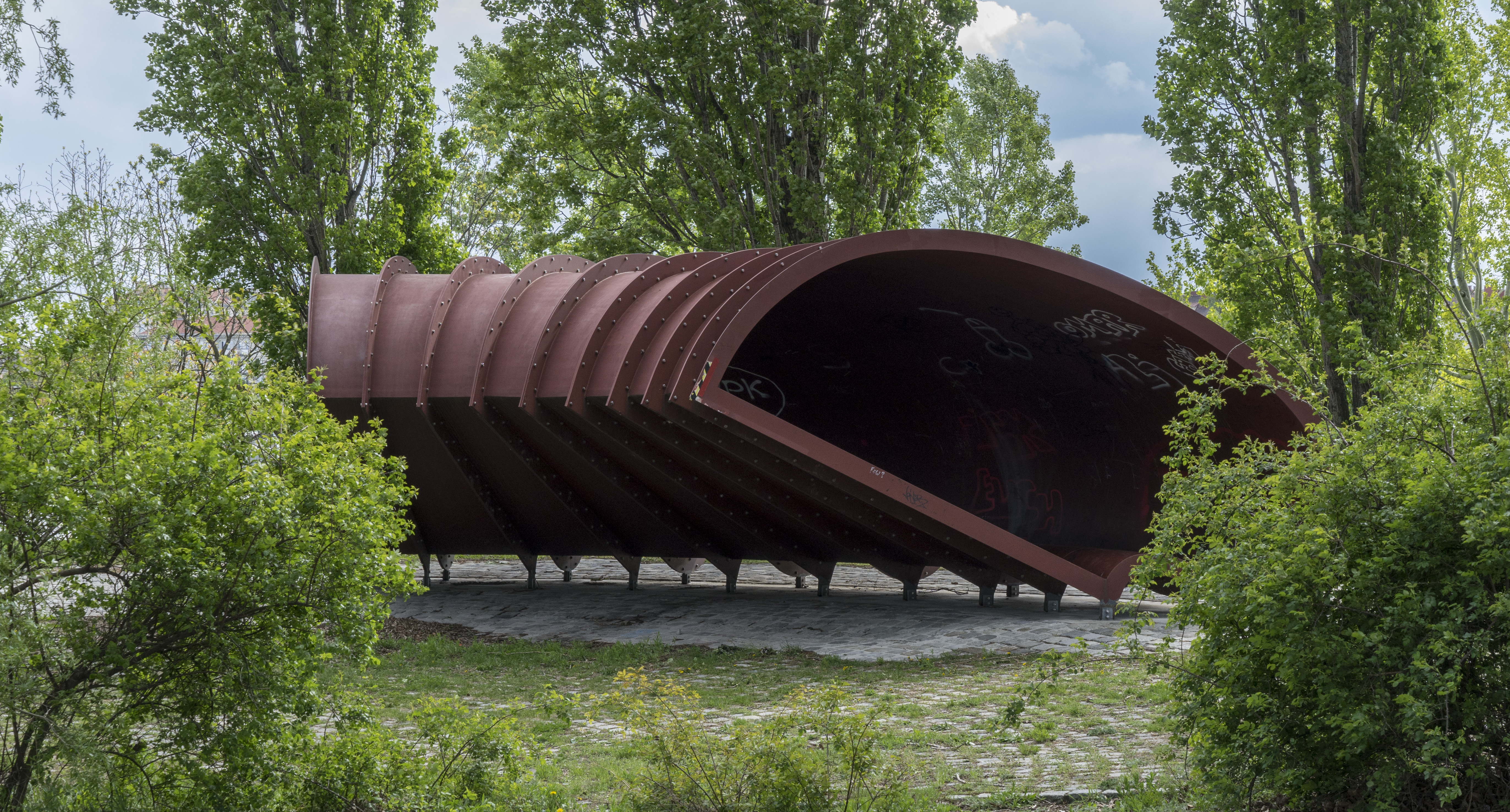 Skulptur Zeitweise, Donaustadt